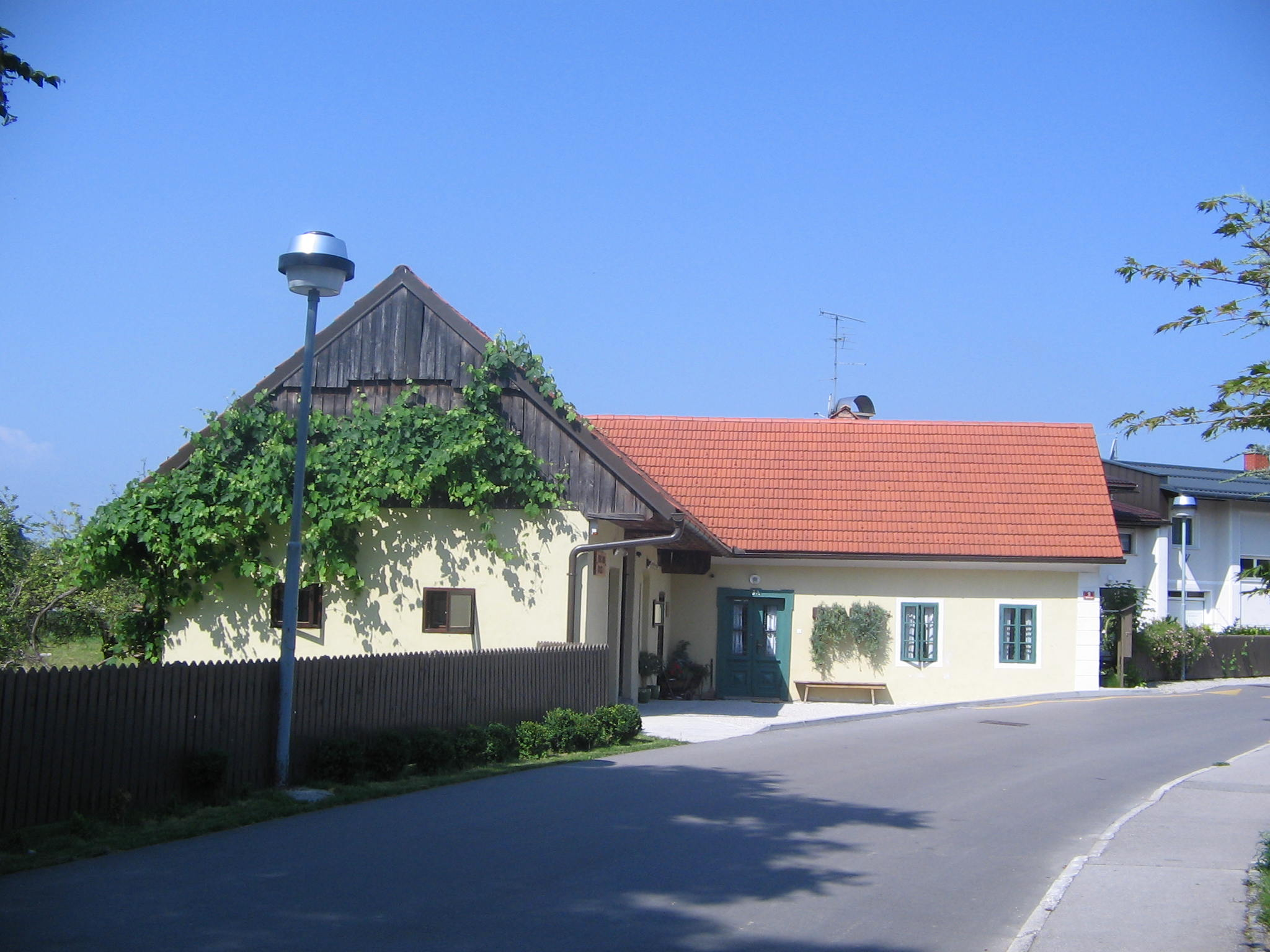 Menačnkova domačija, Domžale, Slovenija